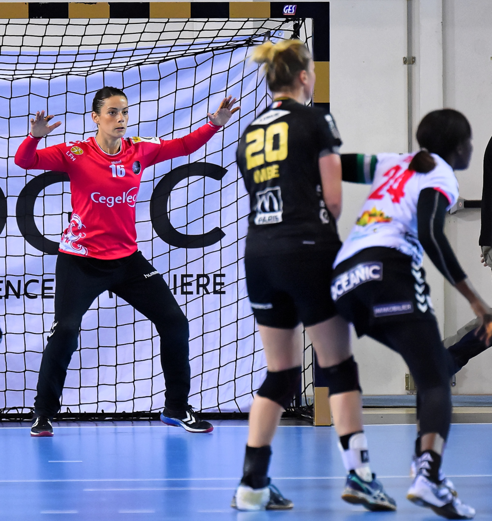 Rencontre de demie-finale de coupe de France entre Issy Paris et Brest. A Issy les Moulineaux, le 26 avril 2017.